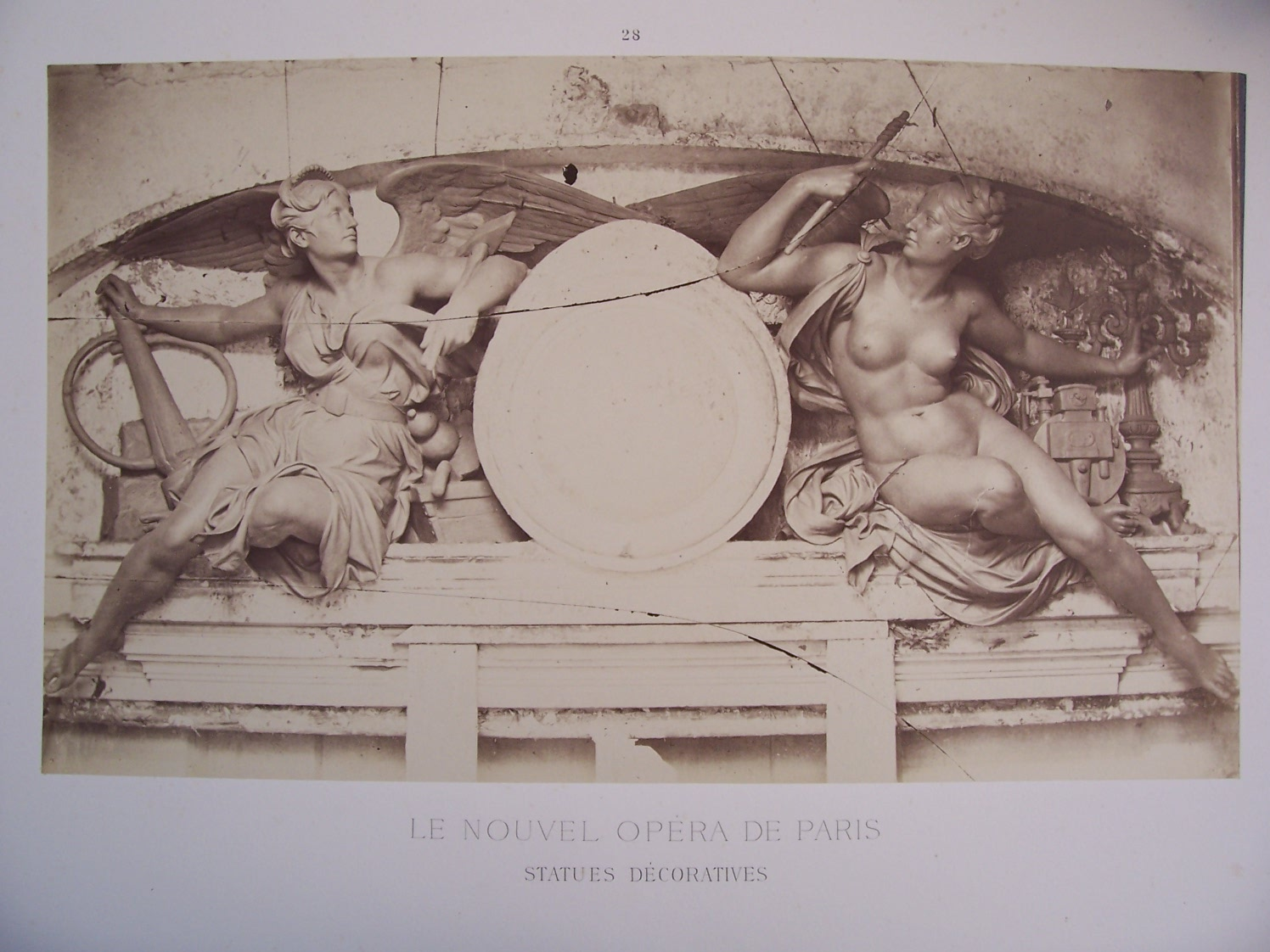 Le Nouvel Opéra de Paris. Statues décoratives (35 planches) Dessus des portes de l'avant-foyer: Planche 28: Pavage et gaz (par Cygnot)